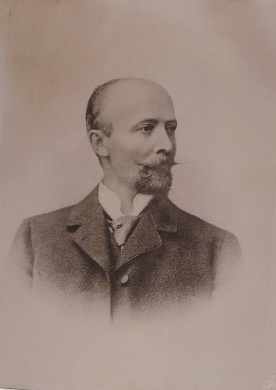 Porträtfotografie von Prof. Dr. med. Rudolf Emmerich (1852-1914)